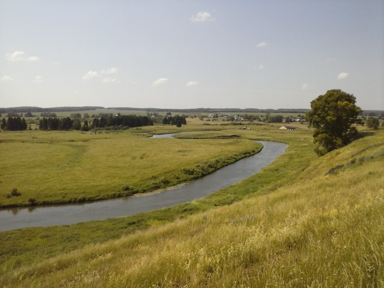 Река Лекма (левый приток Чепцы) возле села Укан, Ярский район Удмуртии